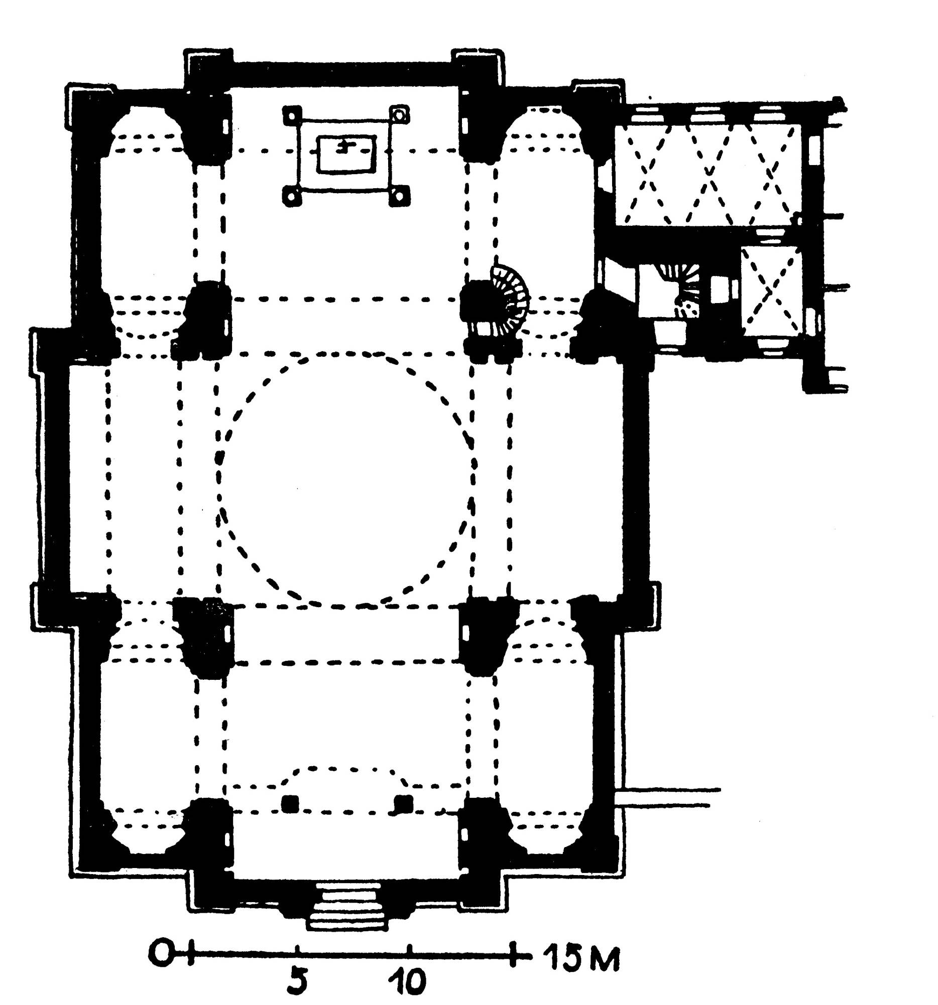 Grundriss der Konviktskirche zum Hl. Herzen Jesu